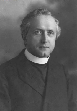 Emil Szramek. Fotografia portretowa pochodząca z archiwum Ilustrowanego Kuriera Codziennego.